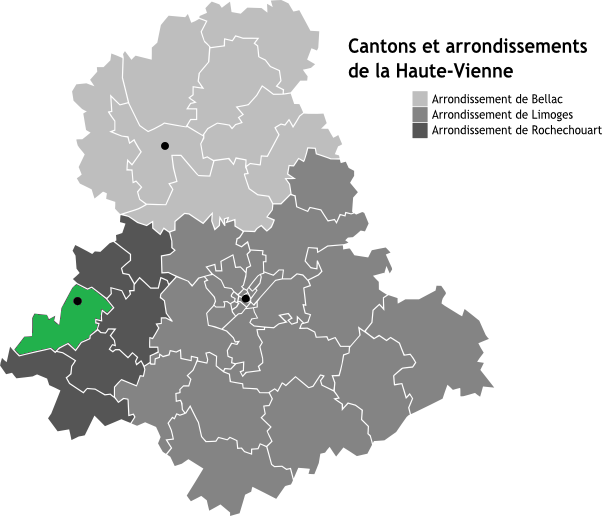 Canton de Rochechouart, Limousin, France en Carte des arrondissements de la Haute-Vienne